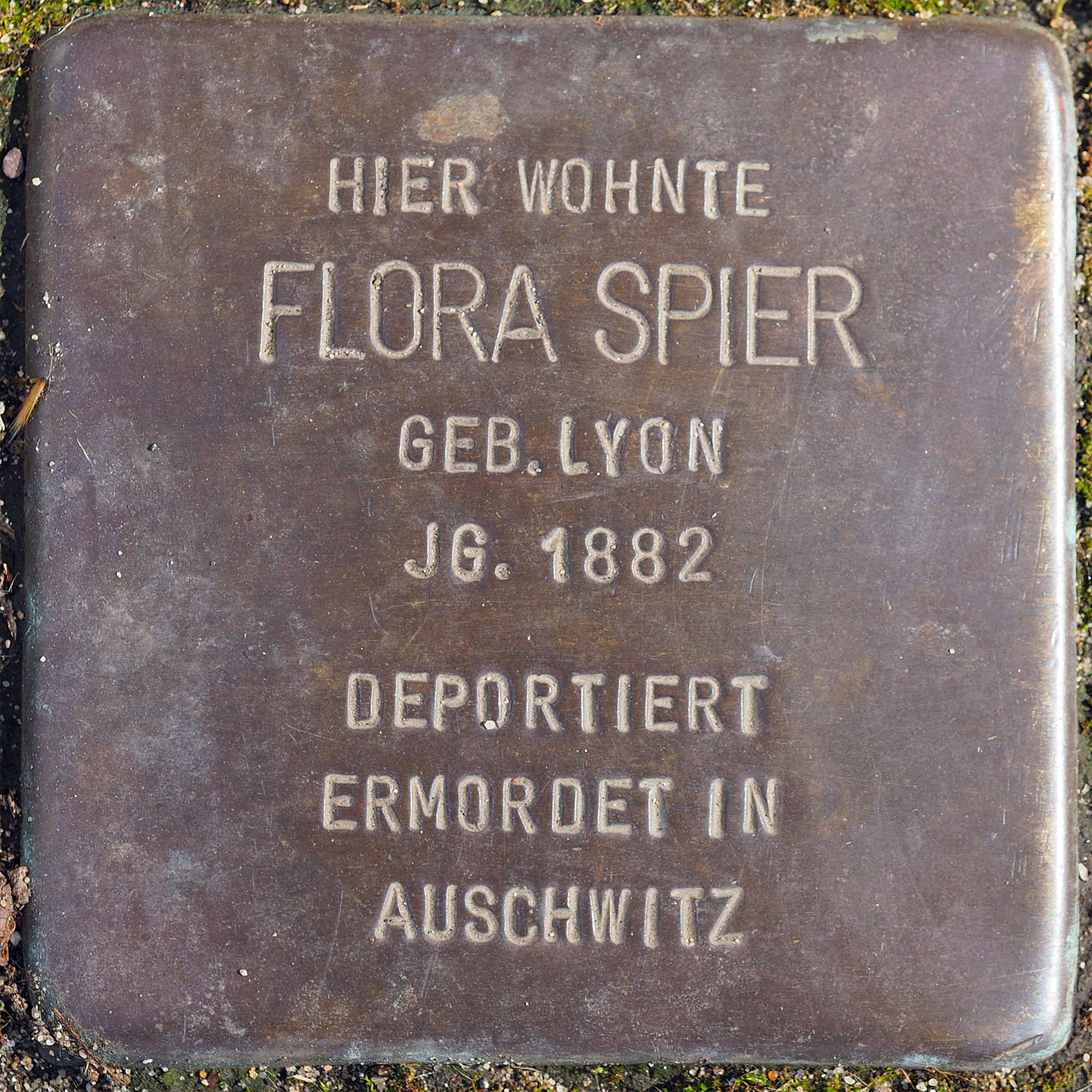 Stolpersteine MG: Spier, Flora